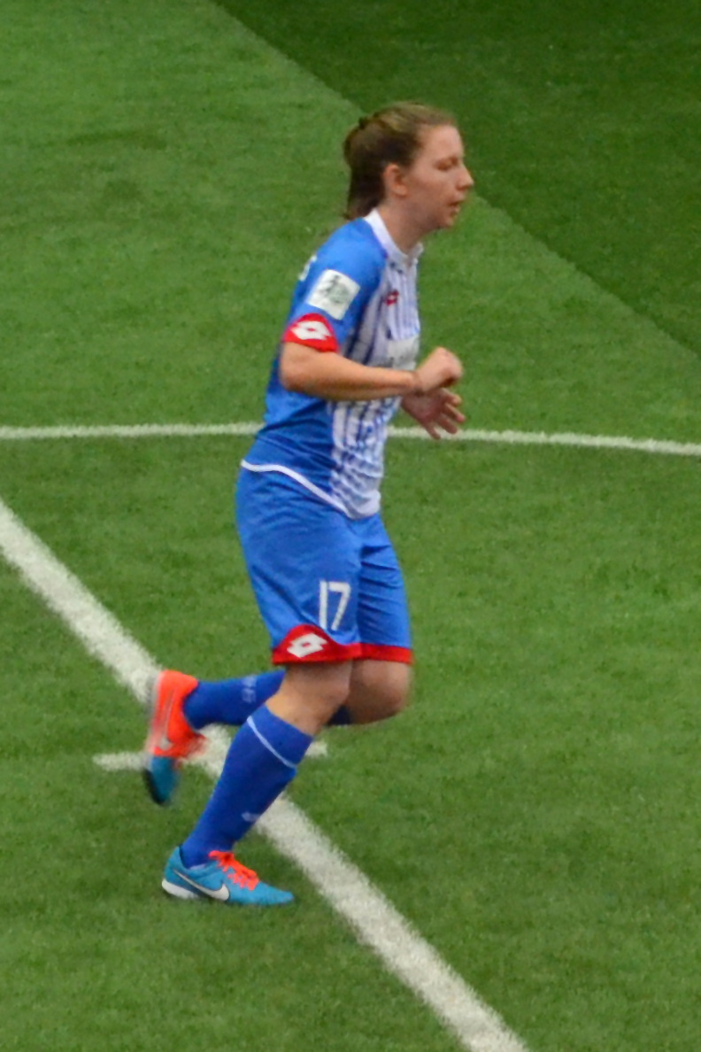 Emily Evels (TSG 1899 Hoffenheim) beim SAP Frauen-FußballCup 2016